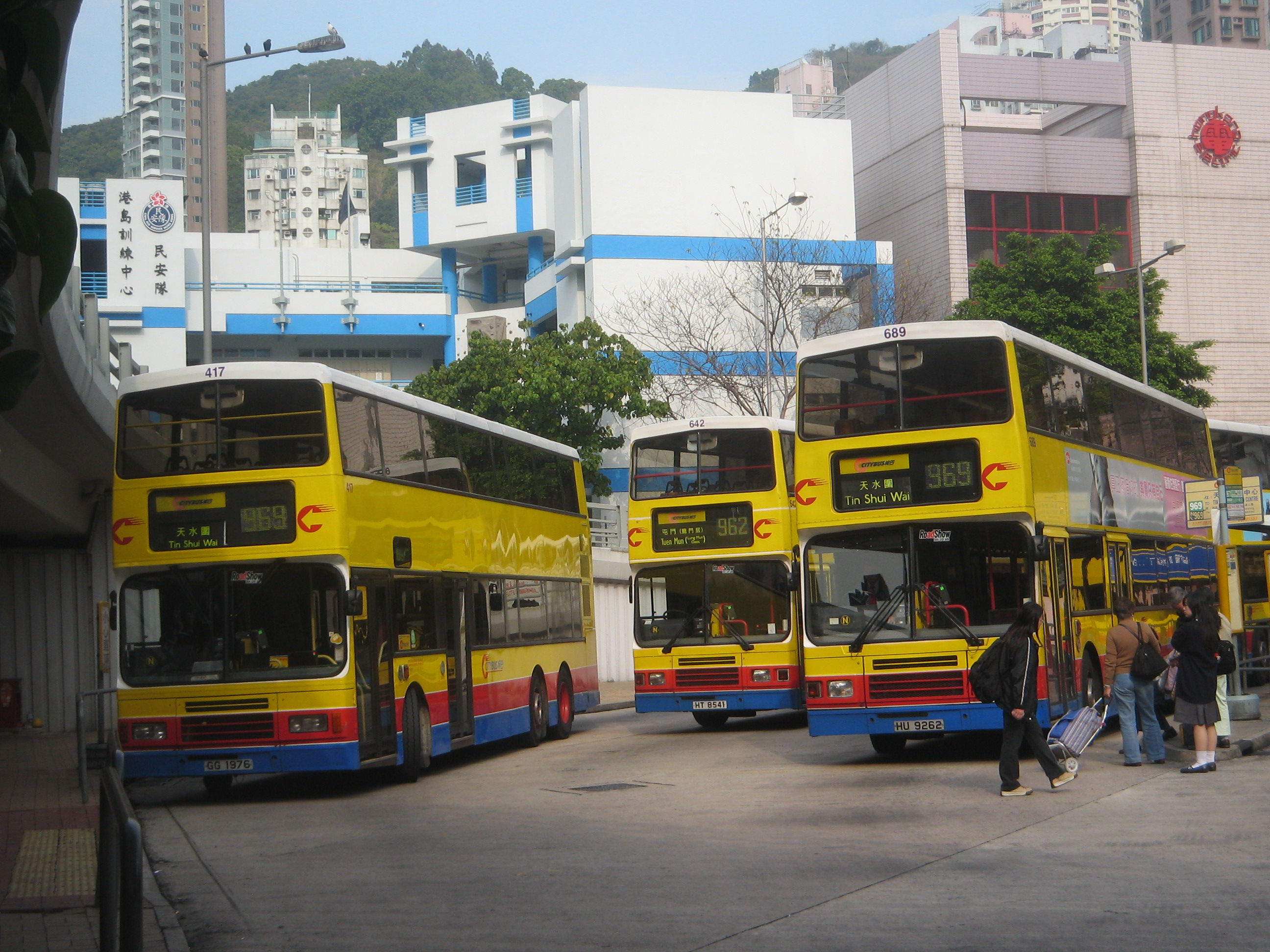 中文（香港）: 摩頓台巴士總站。